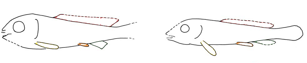 Enchelyolepis